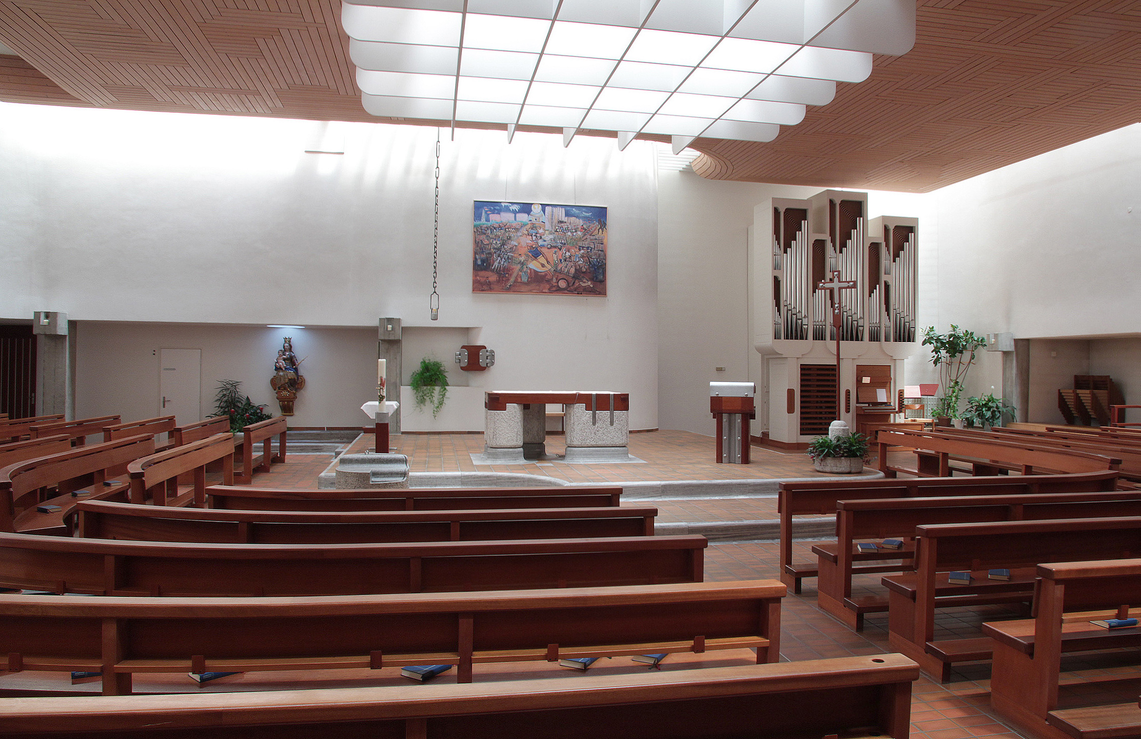 Römisch-katholische Pfarrkirche Maria Hilf Zürich-Leimbach, Altarraum von Peter Travaglini